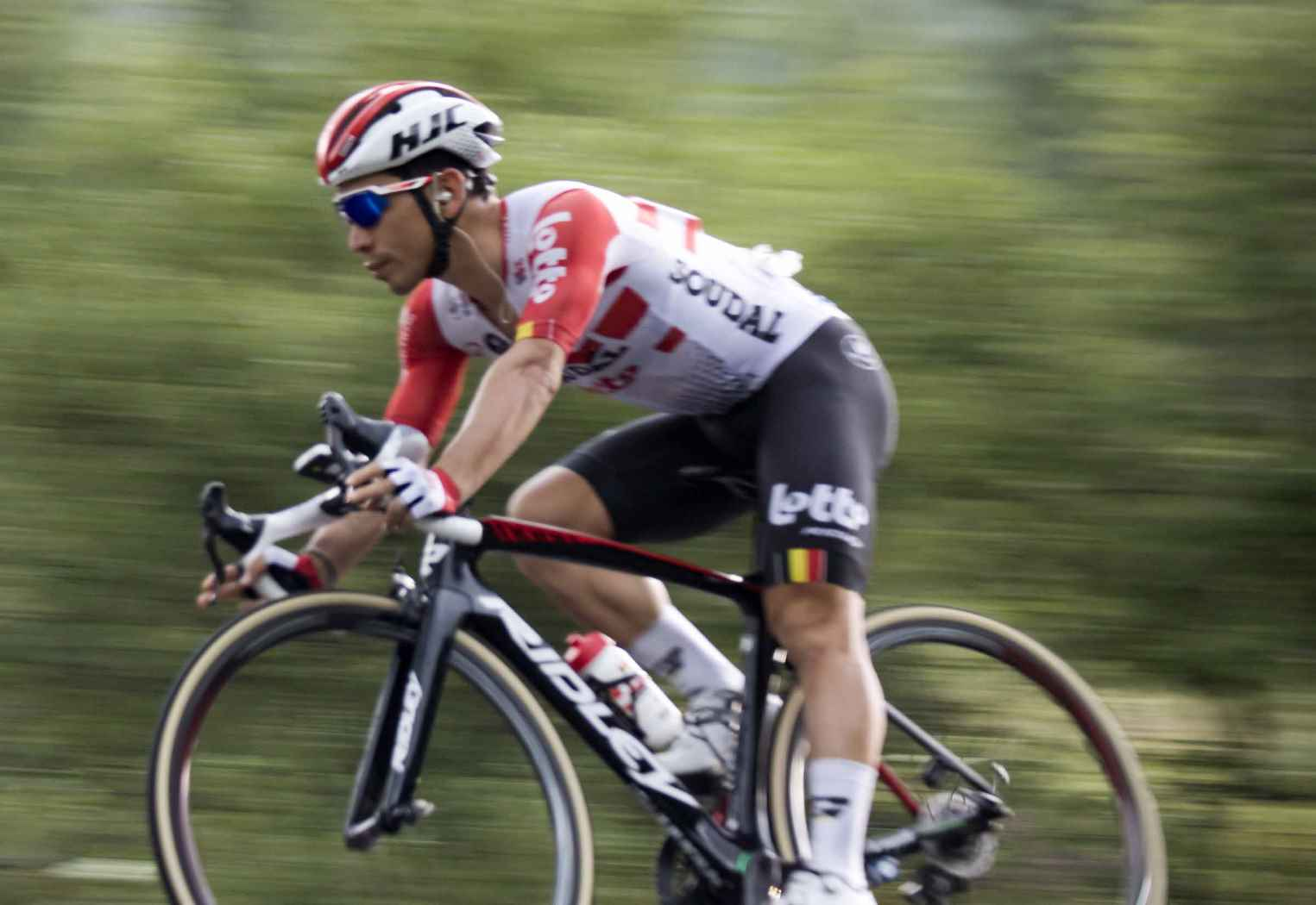 ALP10174 ewan